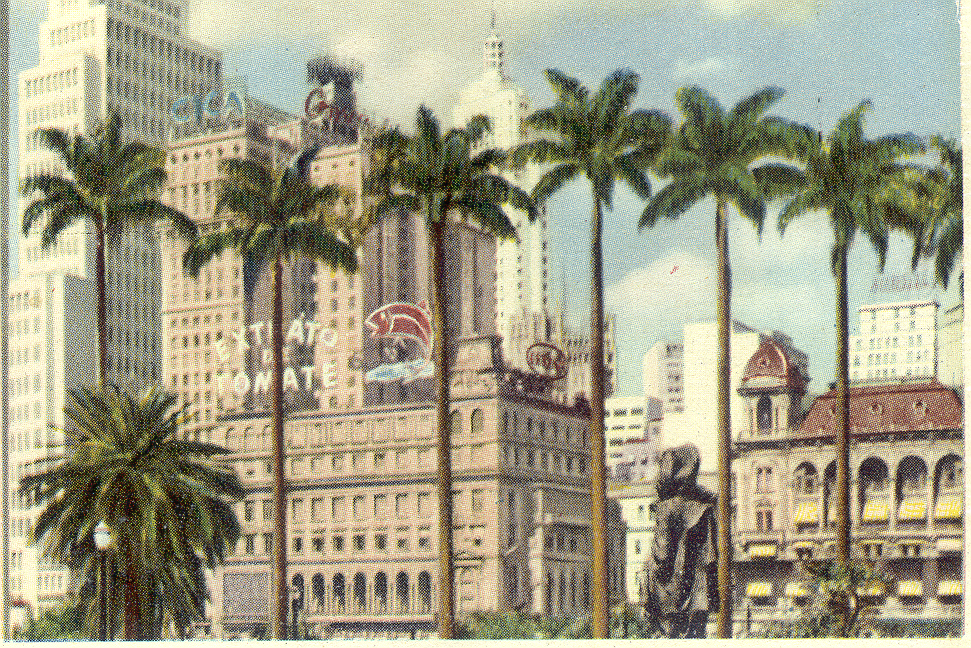 Obra que integra o acervo do Museu Paulista da USP. Coleção Werner Haberkorn